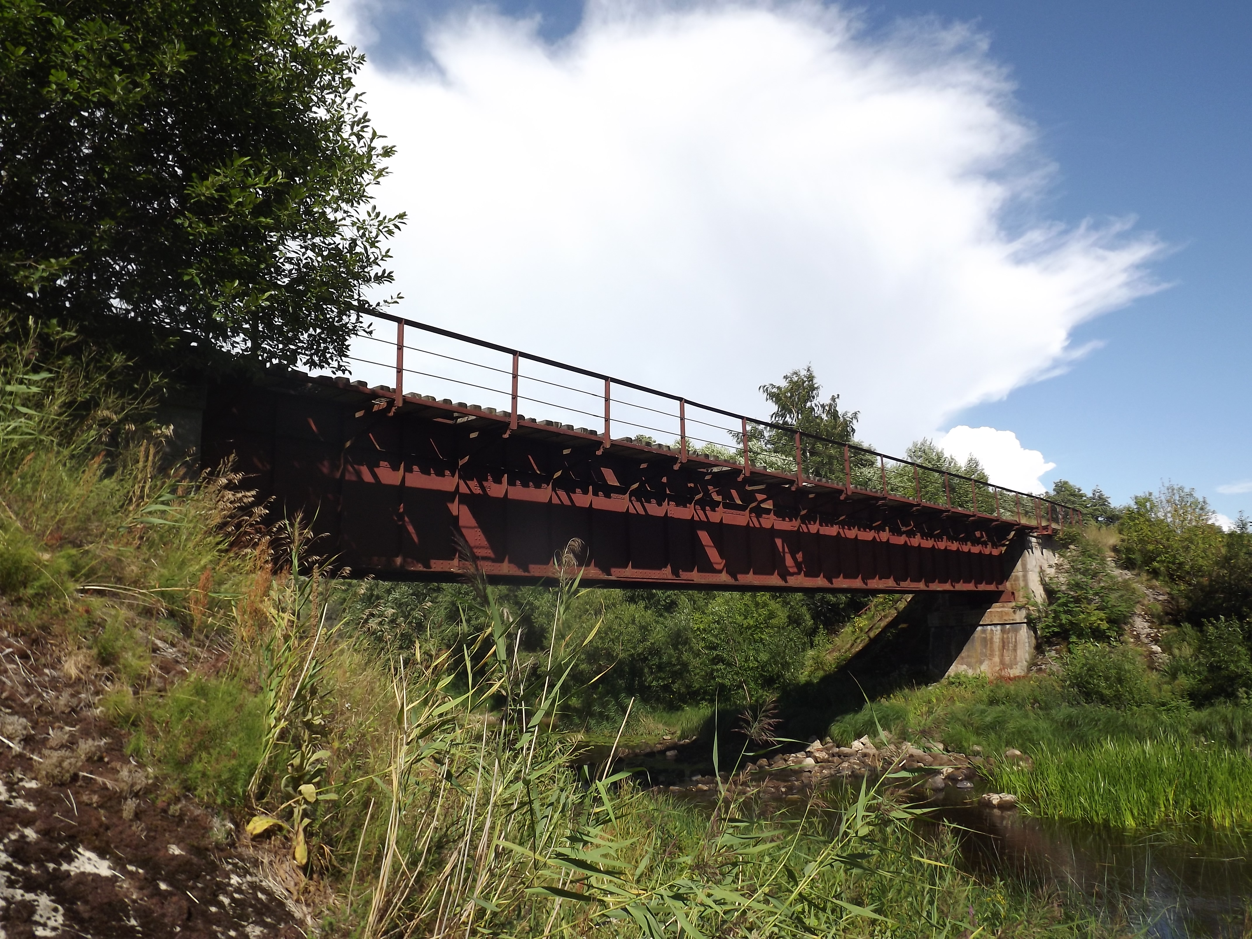 Reiu jõe raudteesild